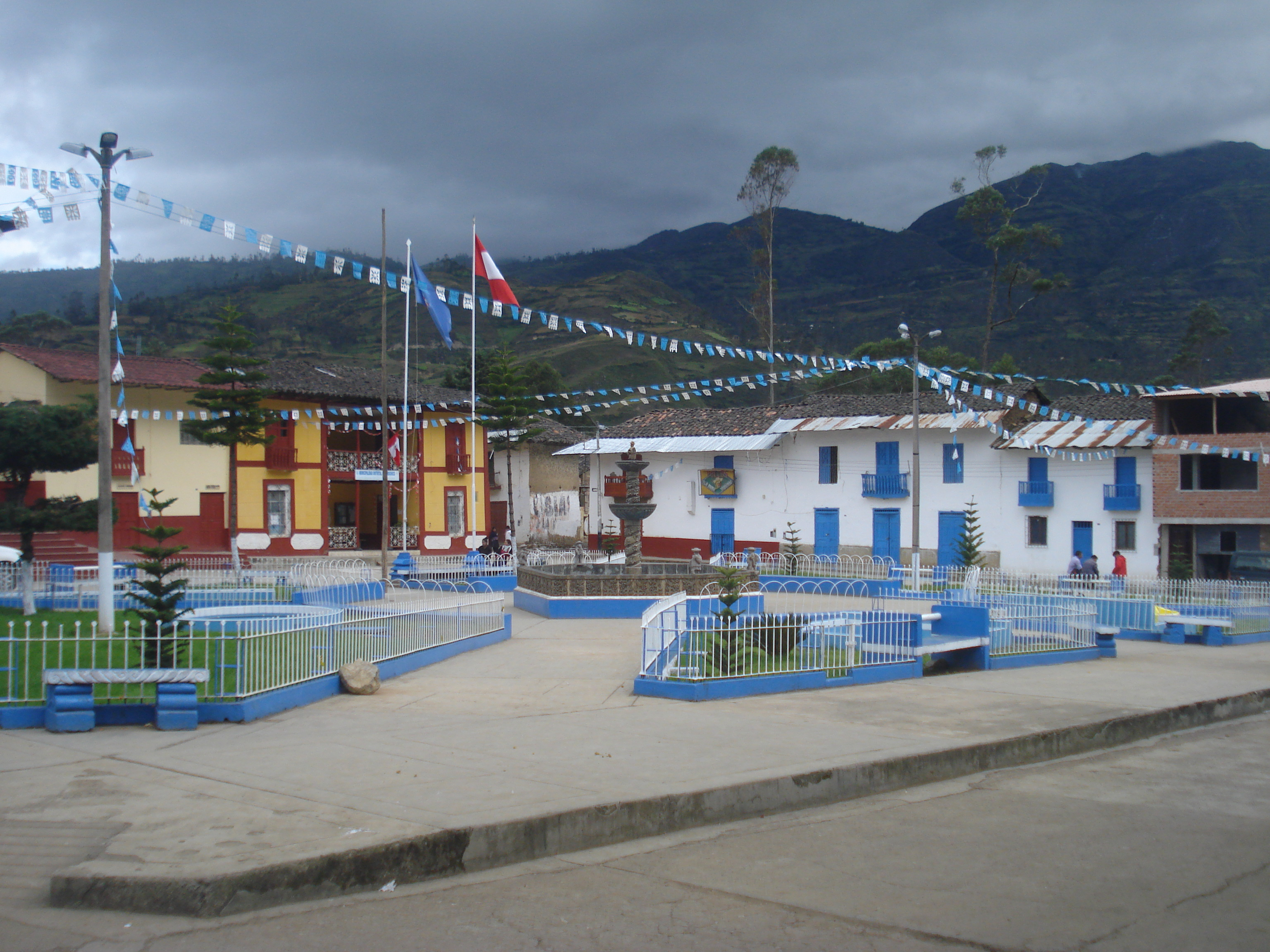 Parque principal de Sorochuco, Distrito Sorochuco, Provincia de Celendín, Región Cajamarca